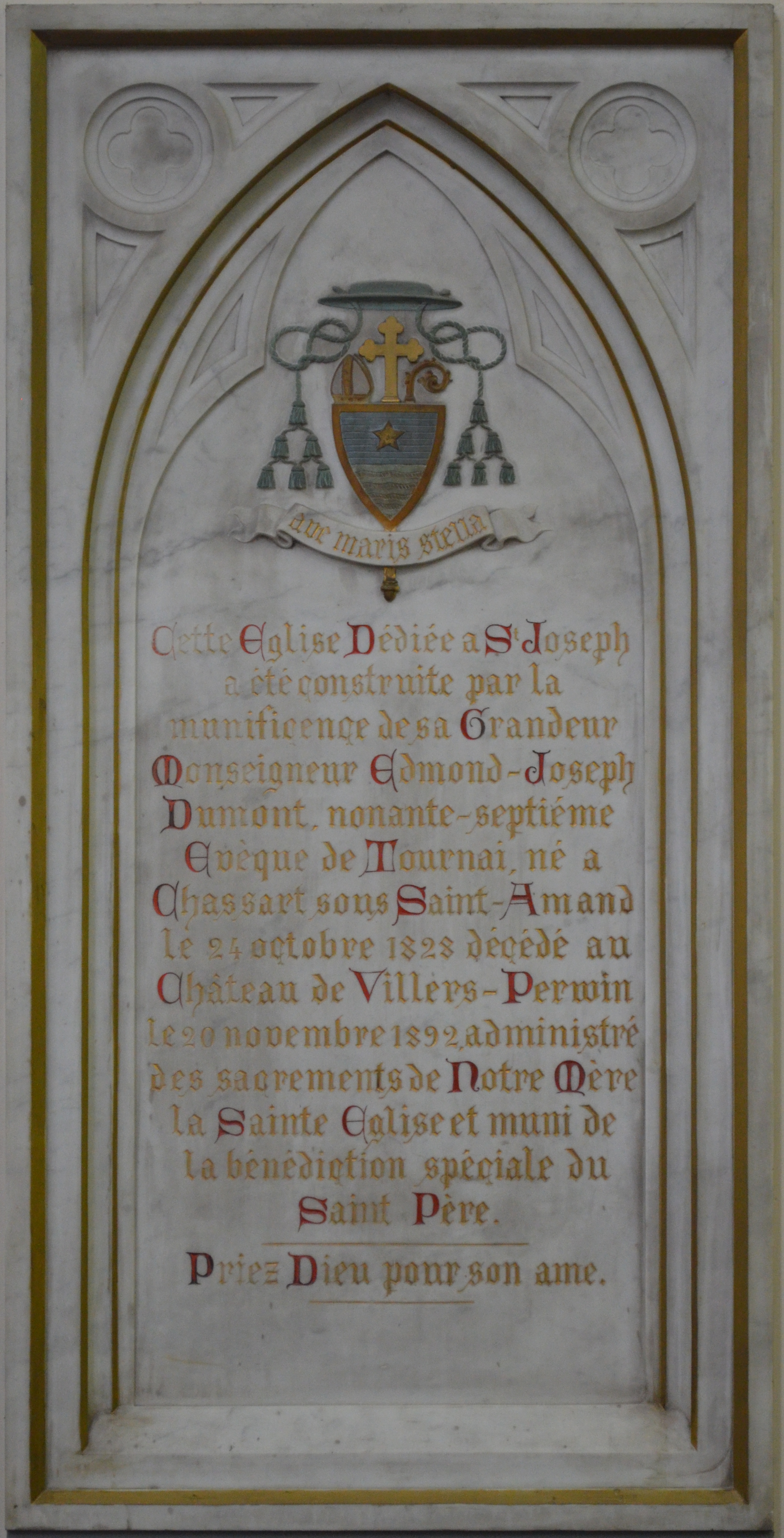 Charleroi (Belgique) - Église Saint-Joseph à la Broucheterre - Plaque en mémoire de Edmond-Joseph Dumont, évêque de Tournai.